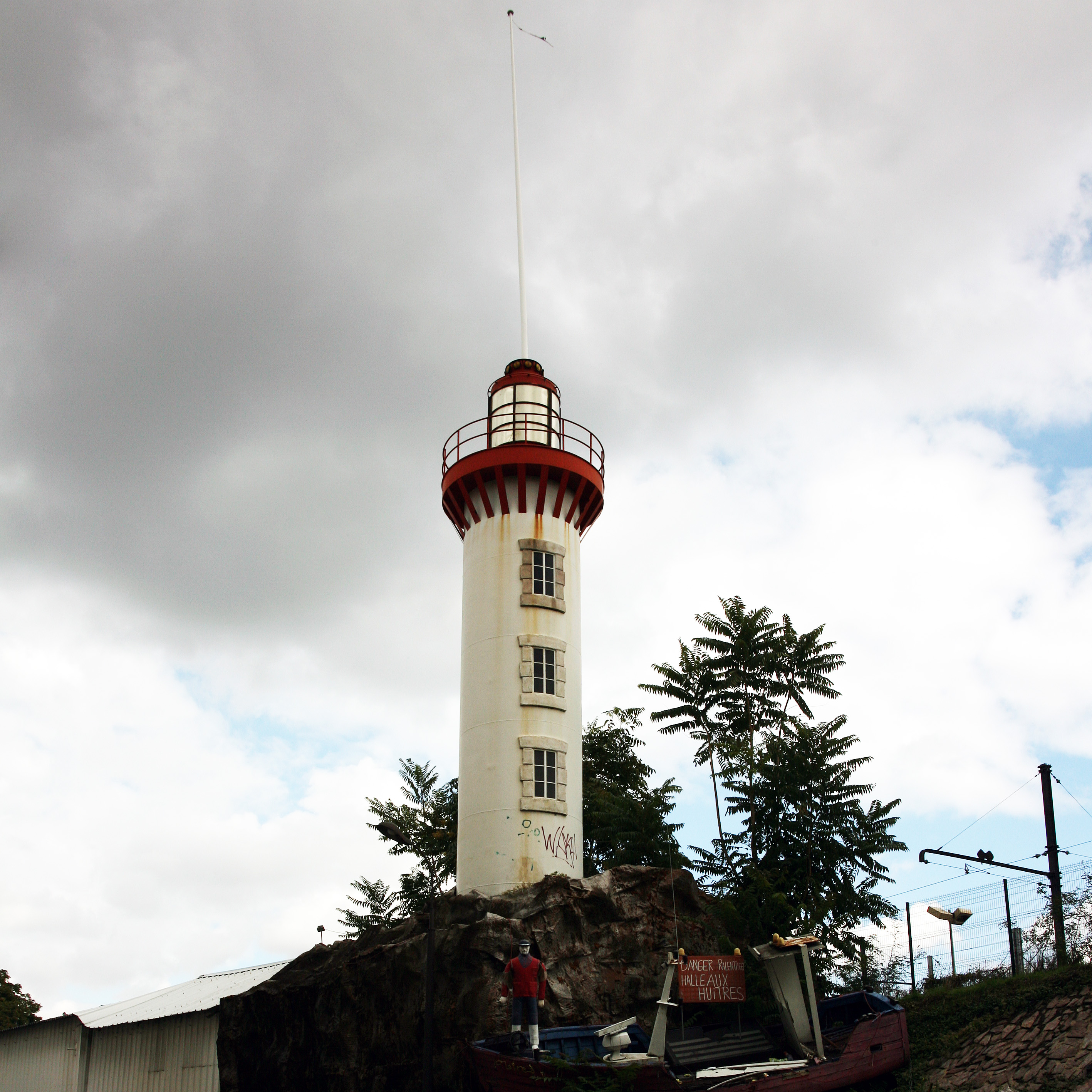 Énorme enseigne d'une poissonnerie, rue Castagnary à l'angle de la rue des Morillons